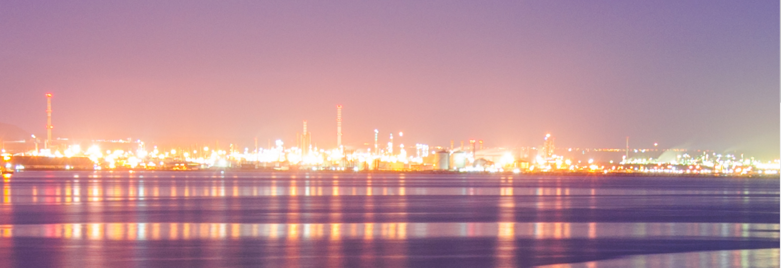 Zona industriale, polo petrolchimico siracusano. Ritaglio di